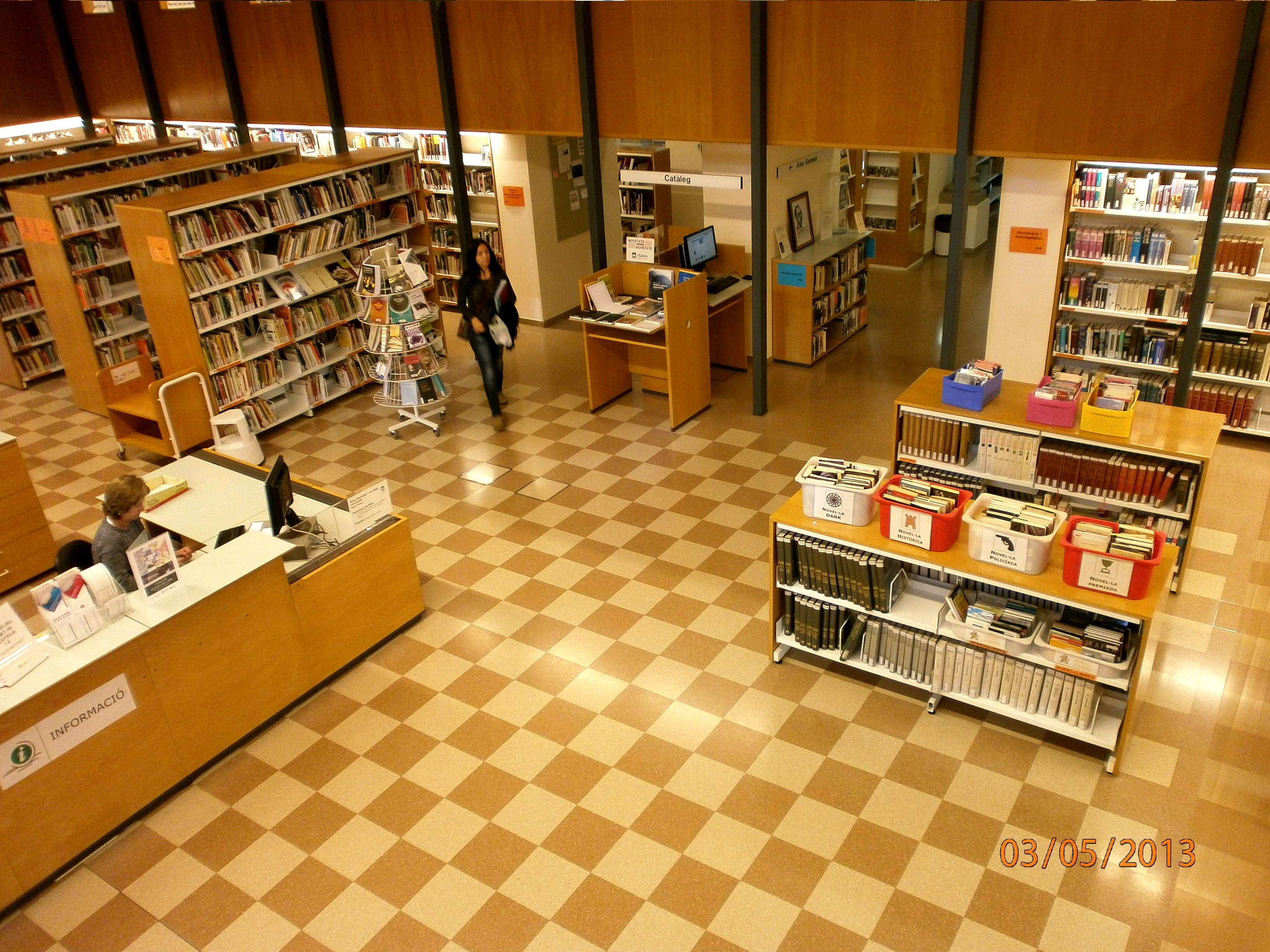 Salon central 3